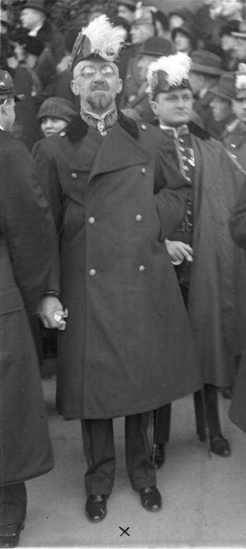 Graf Bosdari, der frühere Botschafter Italiens in Berlin starb in Bologna an den Folgen einer Lungenentzündung! Graf Bosdari, der frühere Botschafter in Berlin aufgenommen während seiner Amtstätigkeit in Berlin.